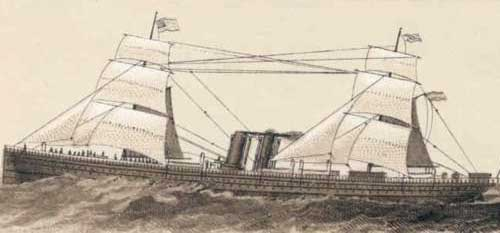 HAPAG Dampfschiff Westphalia (1868–1901)